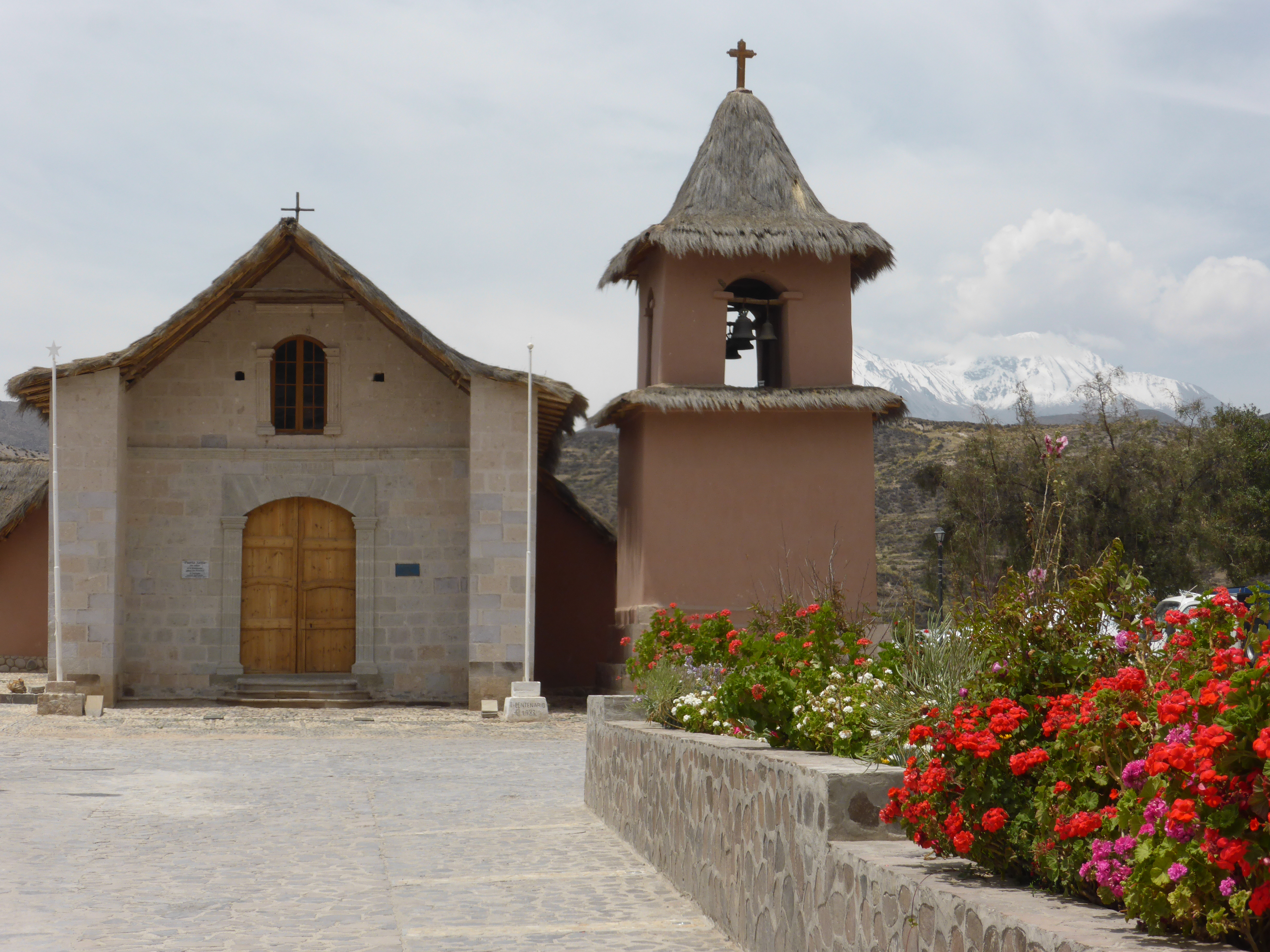 La localidad de Socoroma es de la comuna de Putre, Provincia de Parinacota. La fachada principal de la iglesia, tiene una inscripción sobre la puerta: "ESTA OBRA SE TRABAJÓ EN EL AÑO 1883".